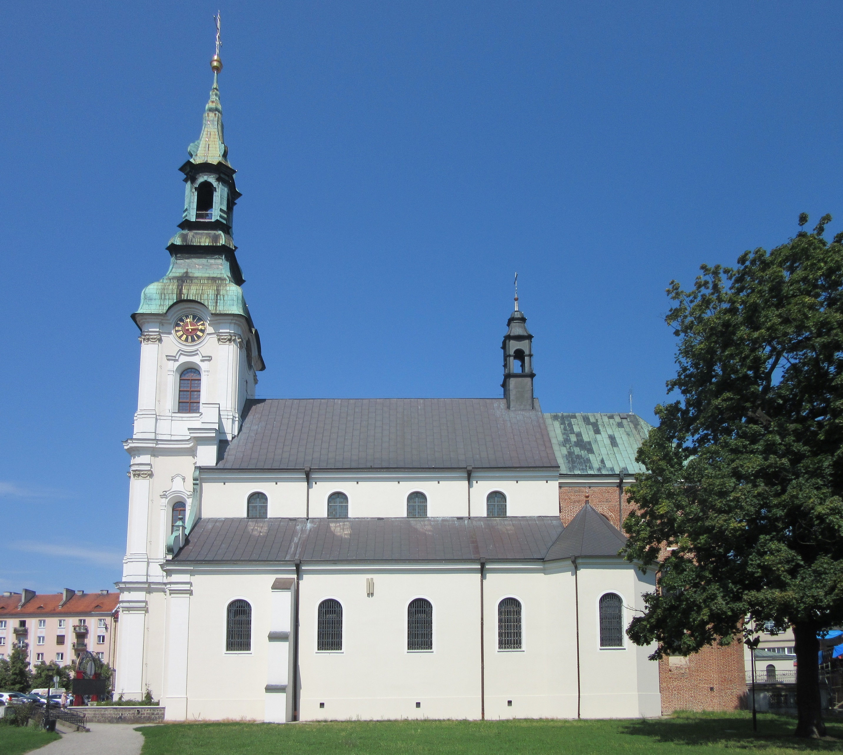 Bazylika kolegiacka Wniebowzięcia Najświętszej Maryi Panny (sanktuarium św. Józefa) w Kaliszu